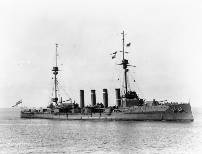 HMS COCHRANE.